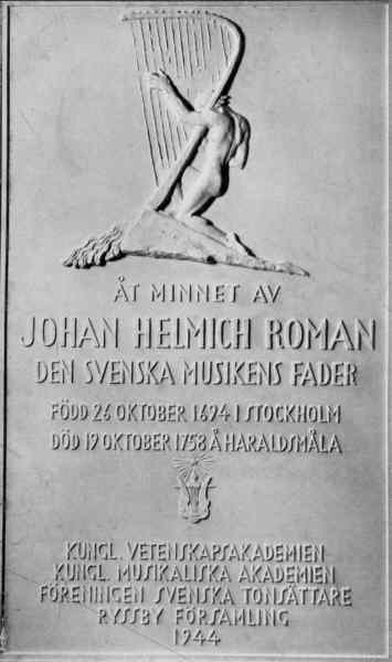 Minnestavla över Johan Helmich Roman, död 1758. Minnestavlan gjord av skulptör Karl Hultström. Kategori: (09) Minnestavlor, minnesstenar Minnestavla över Johan Helmich Roman, död 1758. Minnestavlan gjord av skulptör Karl Hultström.